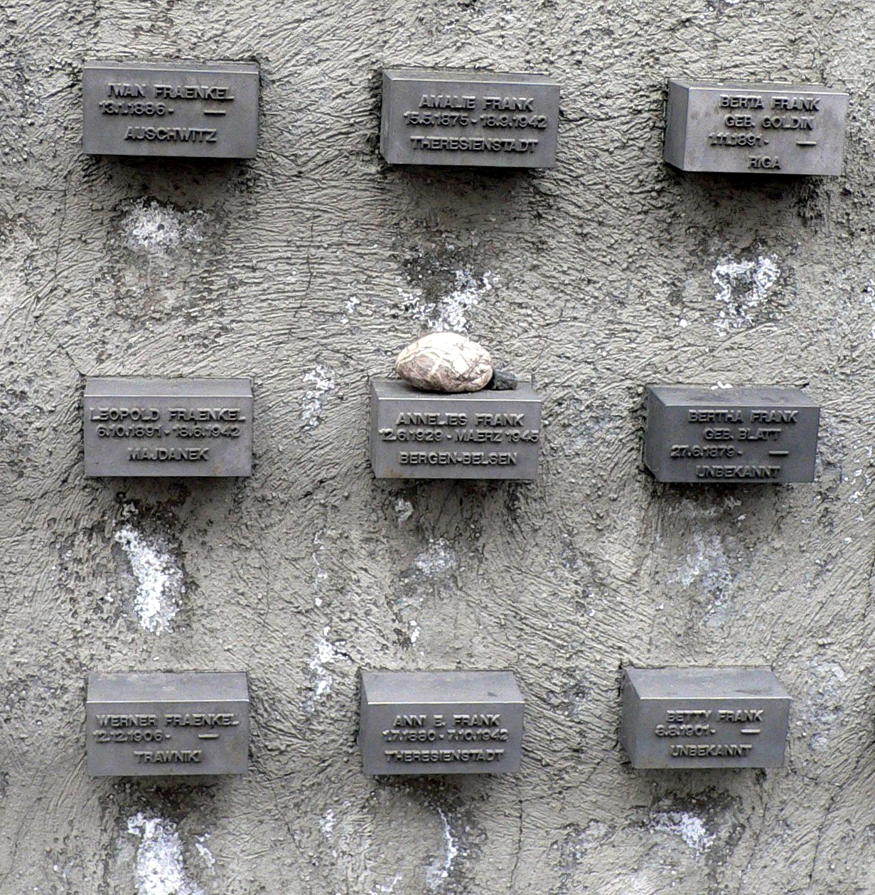 Gedenksteine am Alten Jüdischen Friedhof in Frankfurt am Main; Bildausschnitt: Stein von Anne Frank